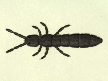 Desoria saltans